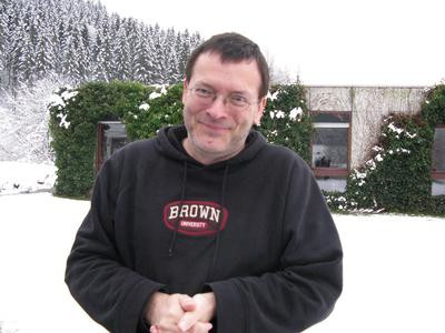 Foto di Bernold Fiedler